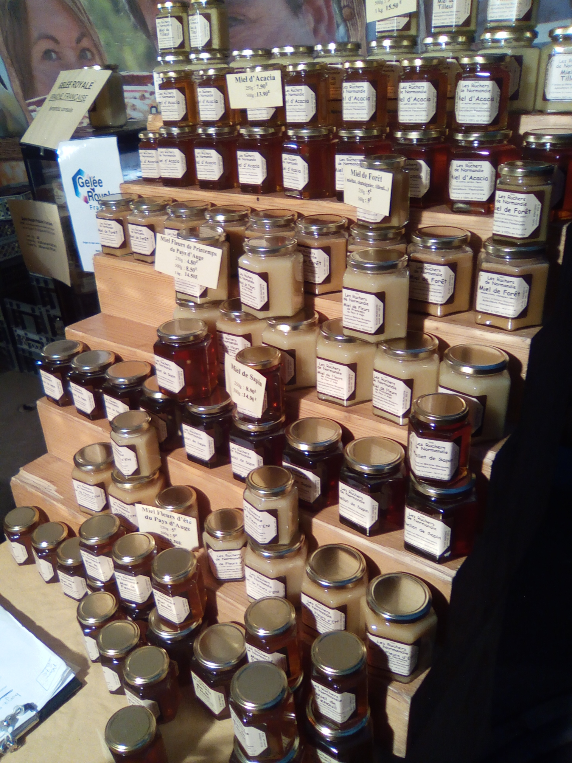 Stand de miel au marché "Pari fermier" rue Saint-Charles, à Paris